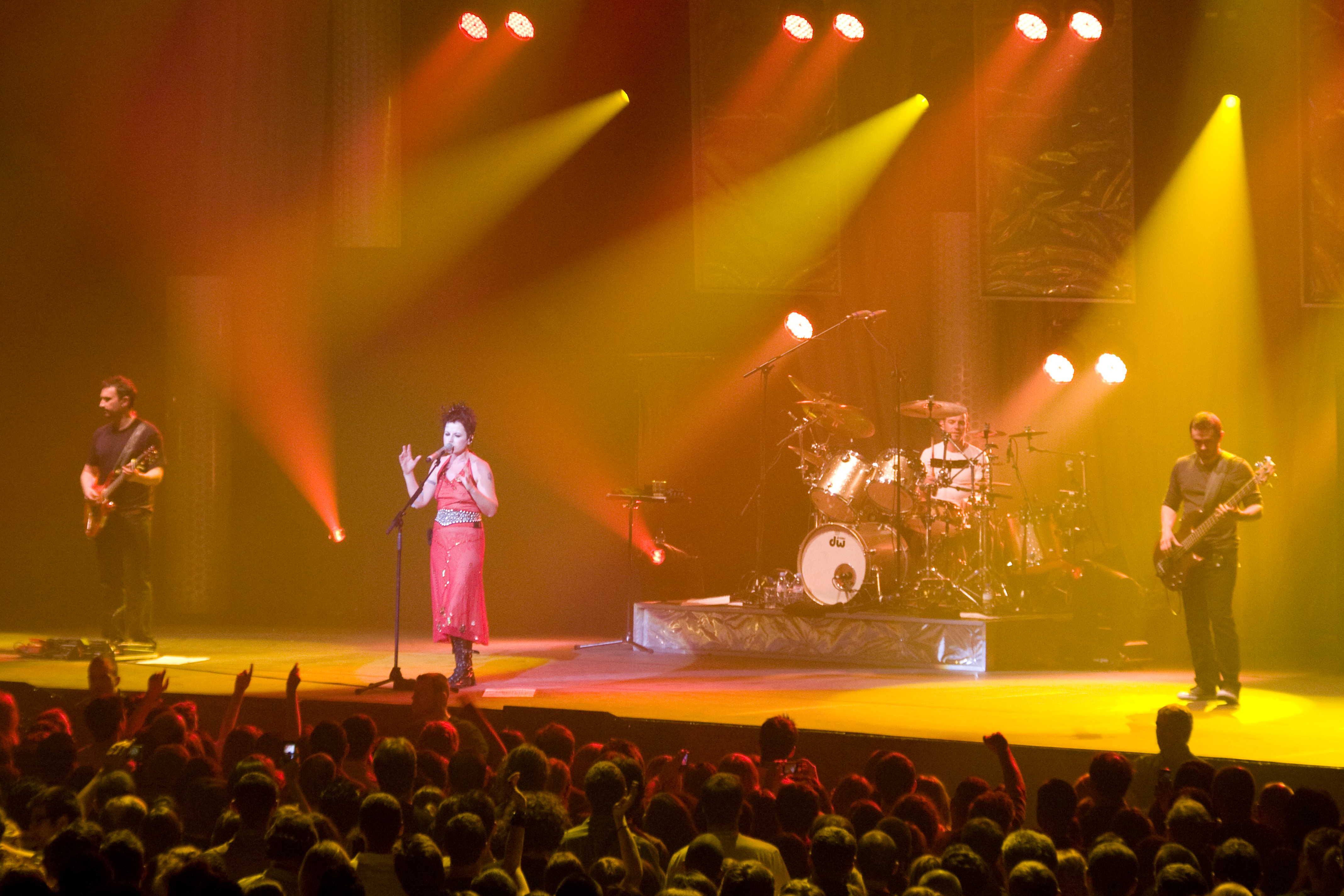 Concert des Cranberries au Zenith de Paris, le 31 mai 2010